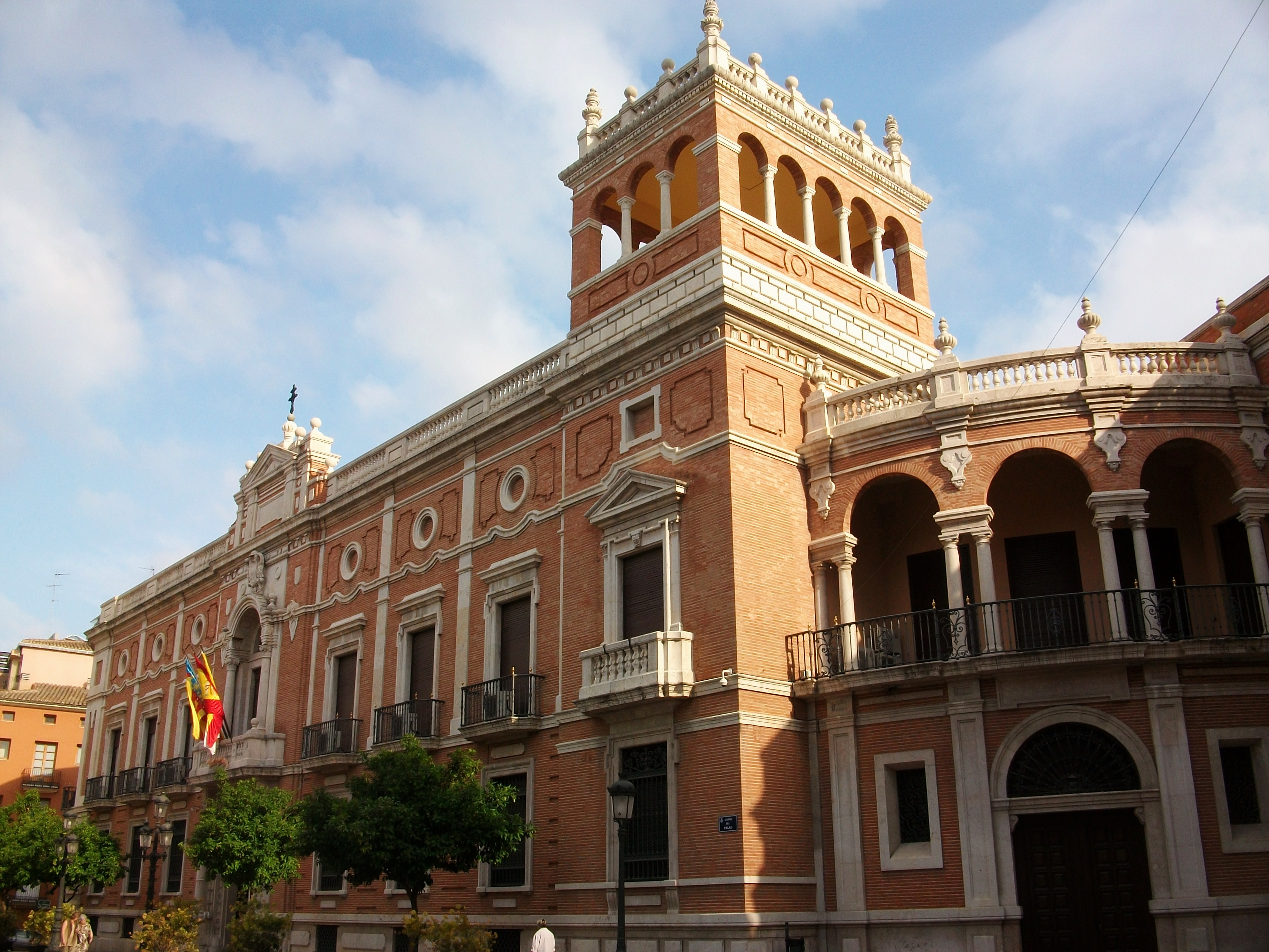 Palau arquebisbal de València.